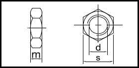 DIN 439